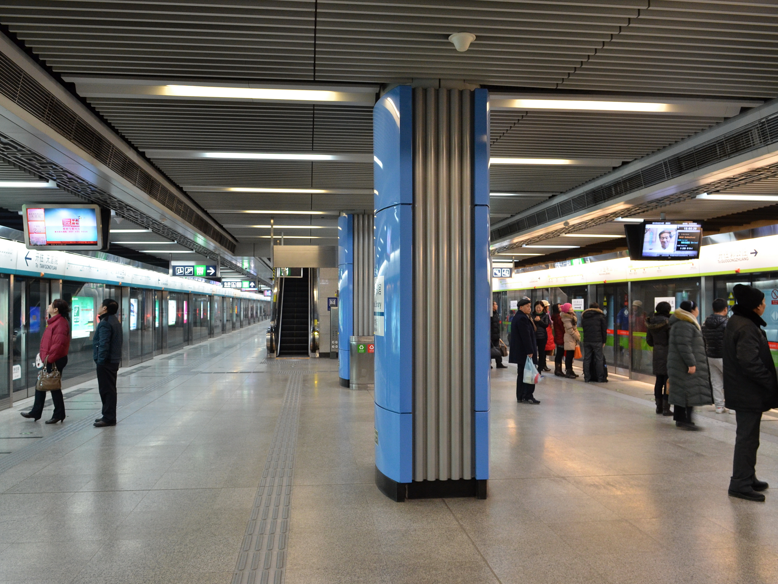 中文（中国大陆）: 北京地铁4号线与9号线同站台换乘的国家图书馆站